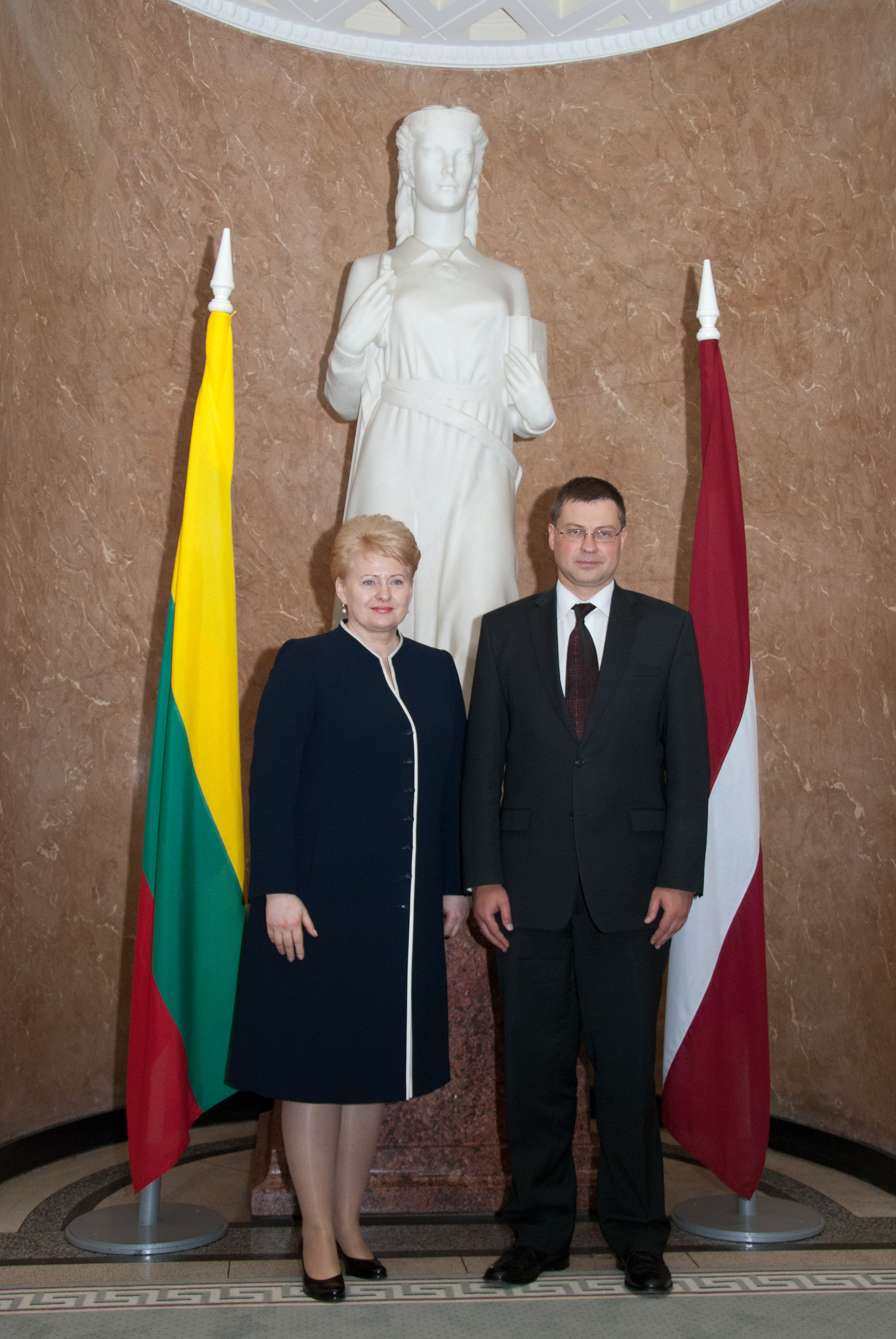 Foto: Toms Norde, Valsts kanceleja